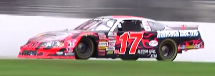 Eddie MacDonald